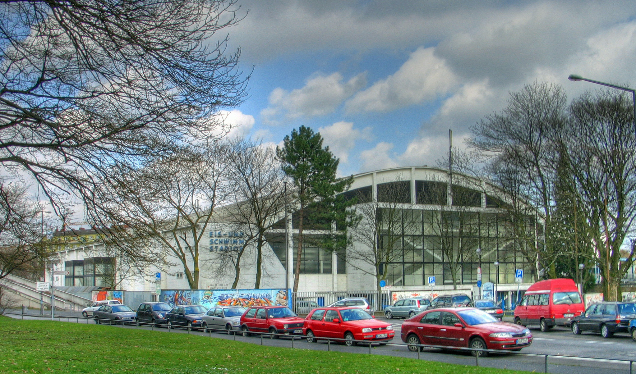 ehemaliges Eisstadion Cologne ( 2008 abgerissen ), Germany - Ice hockey arena